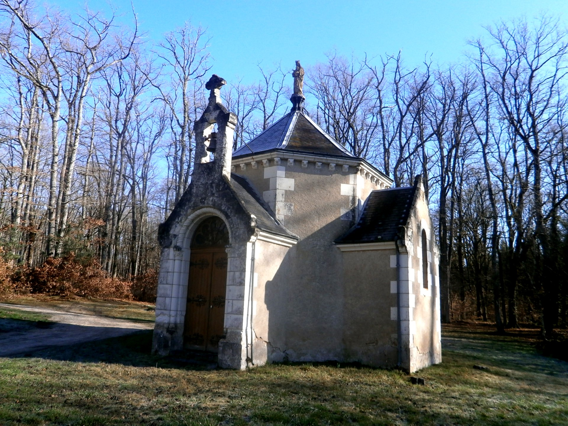 La chapelle Notre-Dame-du-Chêne à Beaumont-Village.